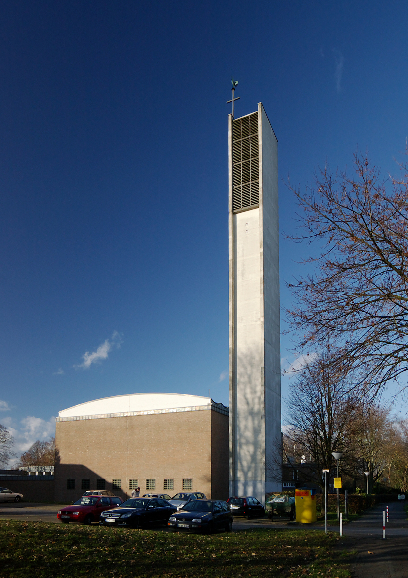 Katholische Kirche St. Martin in Dortmund, Gabelsberger Straße